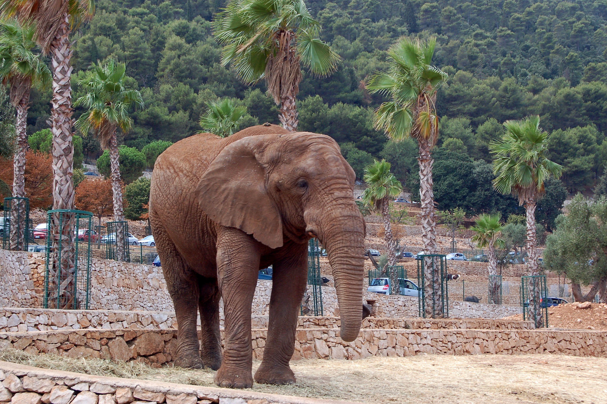 Zoosafari